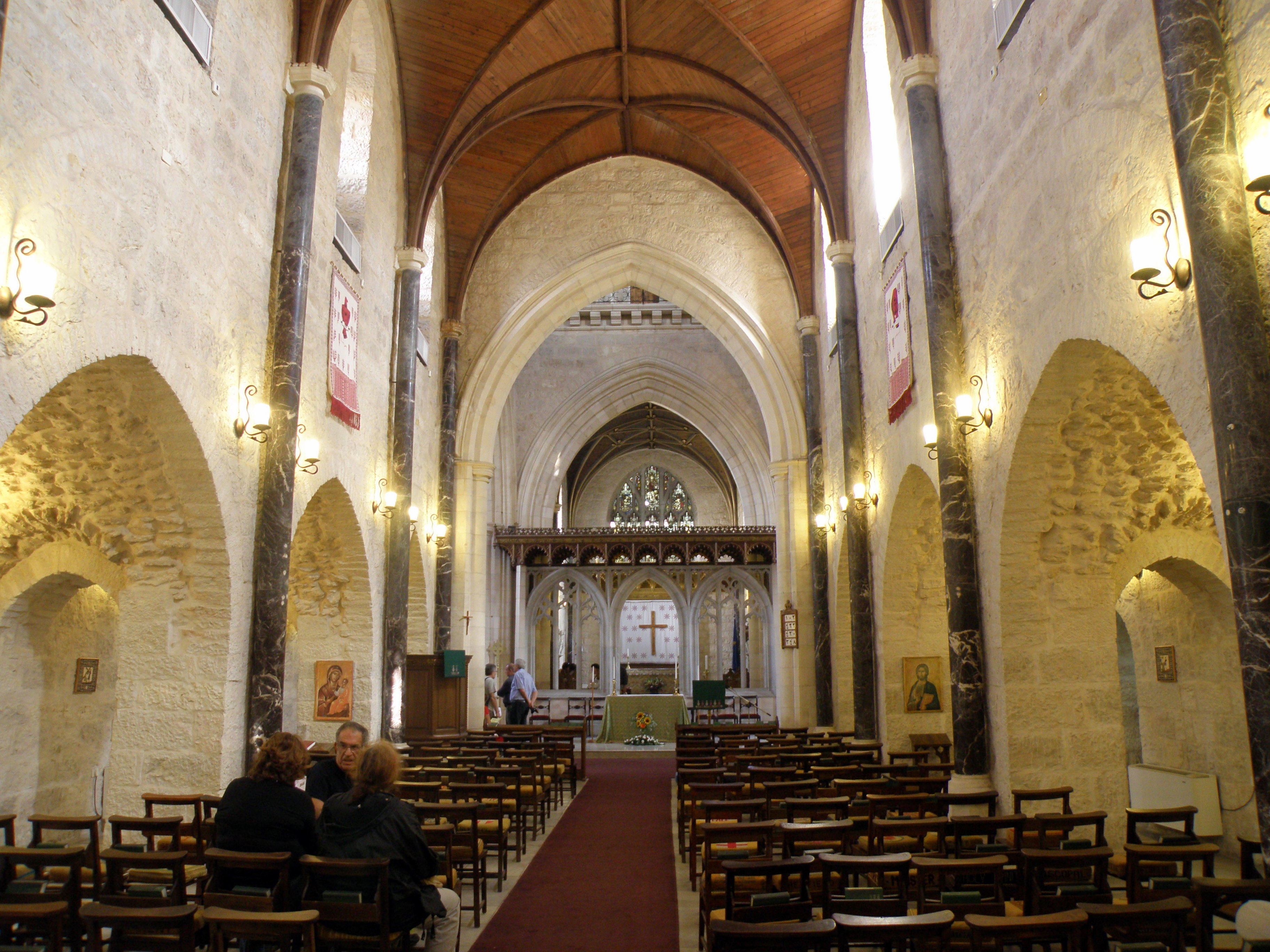 בתים מבפנים 2010 - קתדרלת סנט ג'ורג' Jerusalem